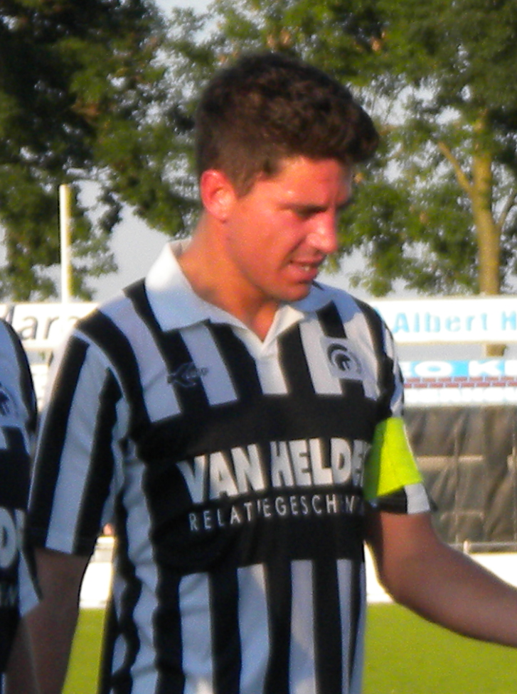 Achilles '29 player Twan Smits walks off the pitch at half time during the friendly with Sporting Lisbon